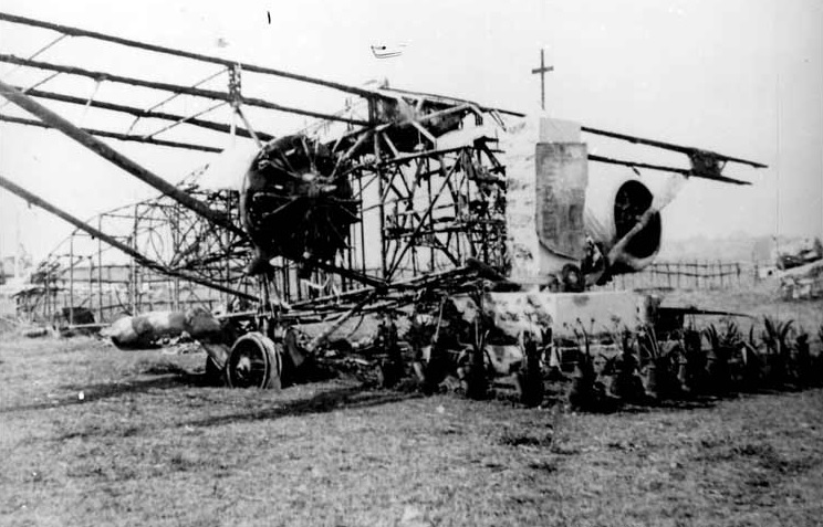 I resti di un aereo Caproni Ca. 133 trasformati in memoriale dei caduti della spedizione del Generale Magliocco a Bonaia, Lekempti, Etiopia